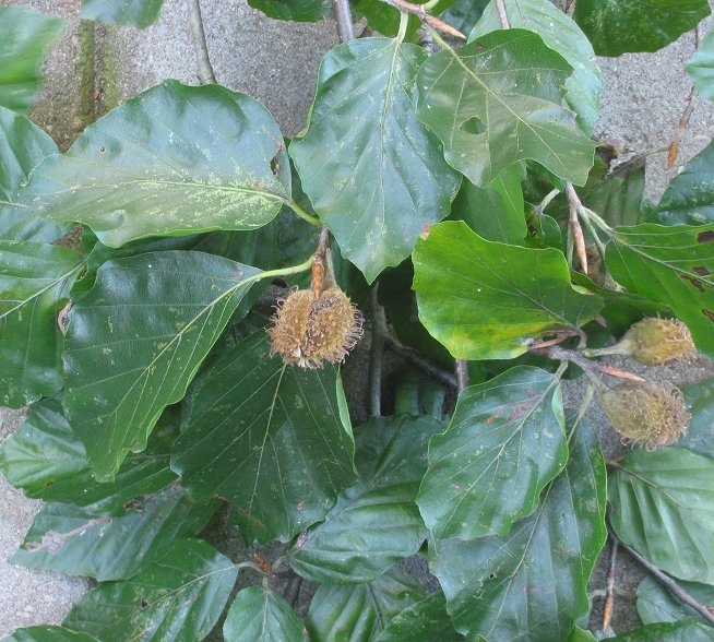 zelfgemaakte foto van tak van beuk met vruchten; half september